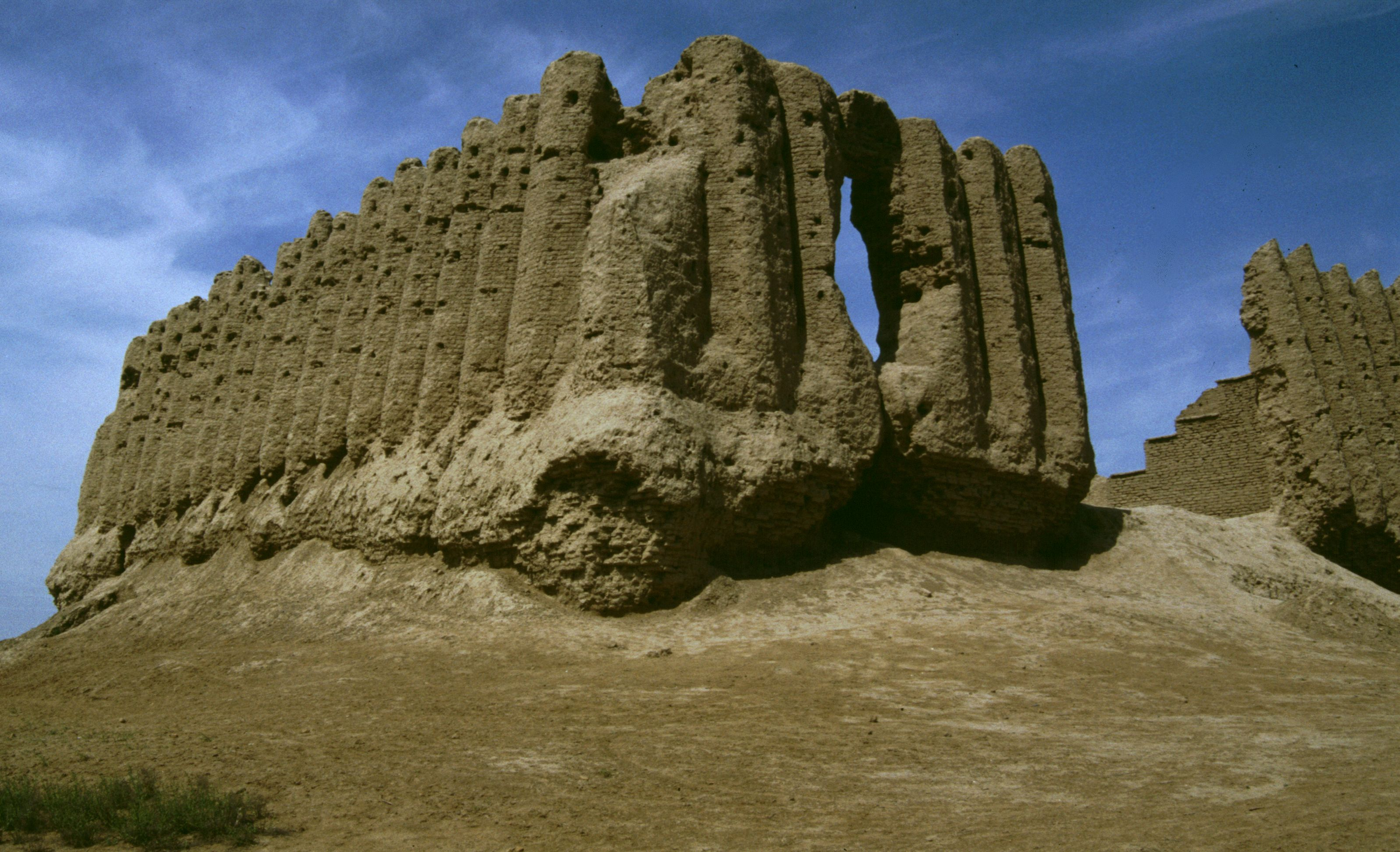 Merw: große Kyz Kala